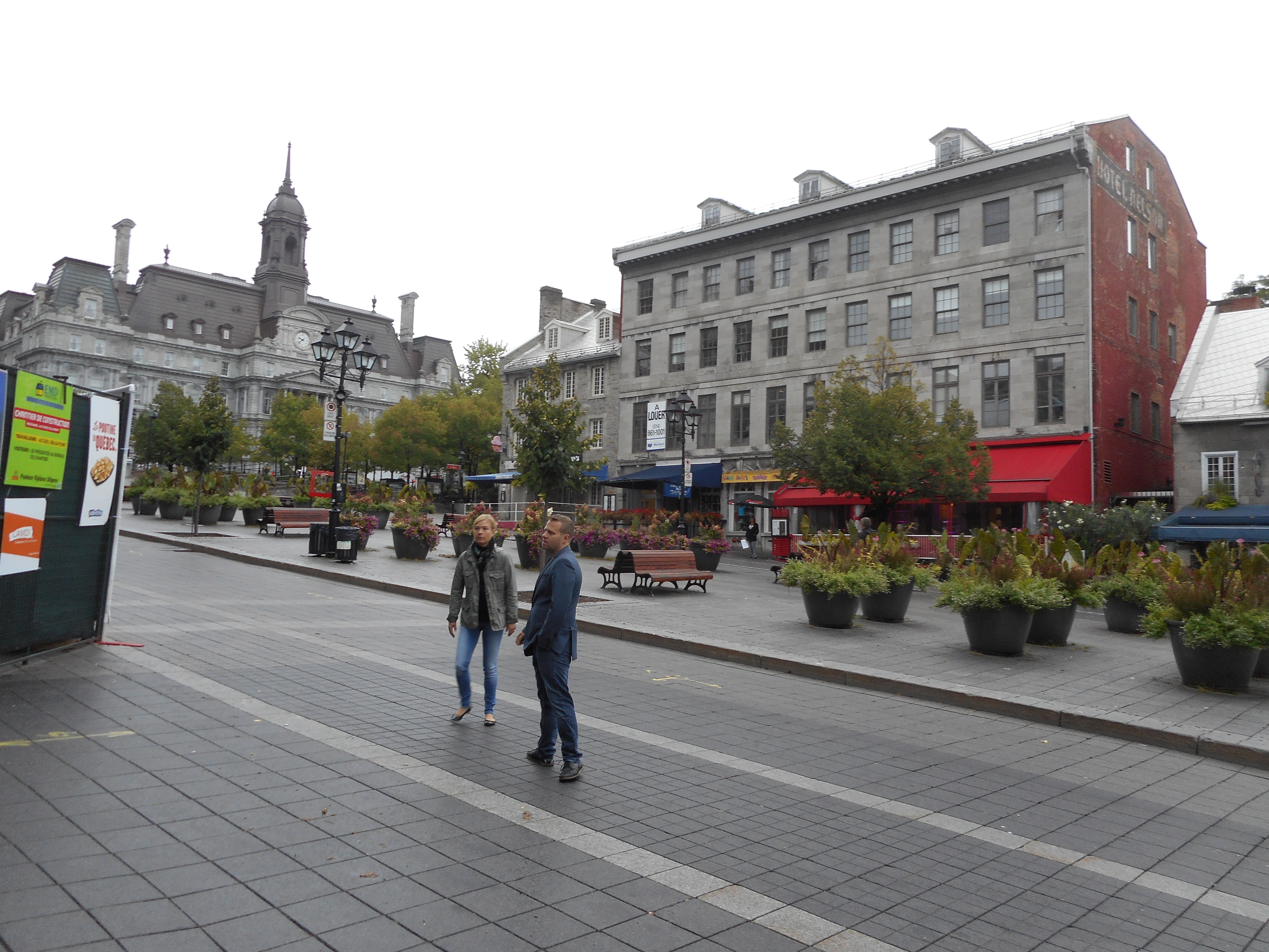 Place Jacques-Cartier, Montréal